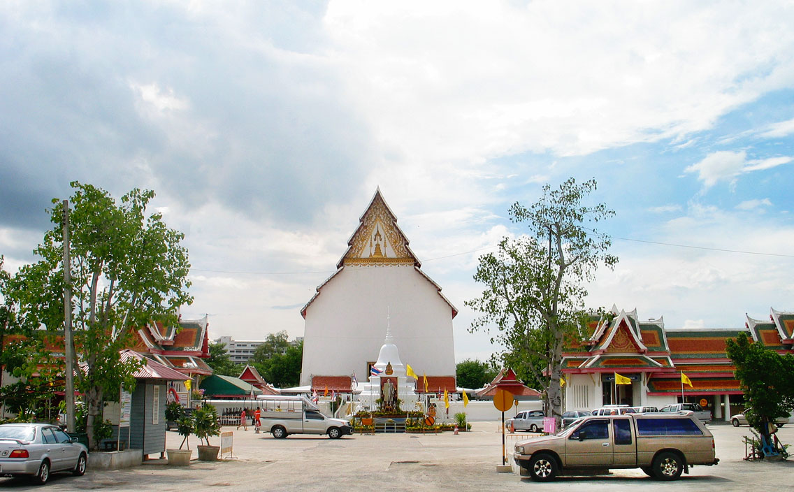 Wat Pa Lelai, Suphanburi, Thailand